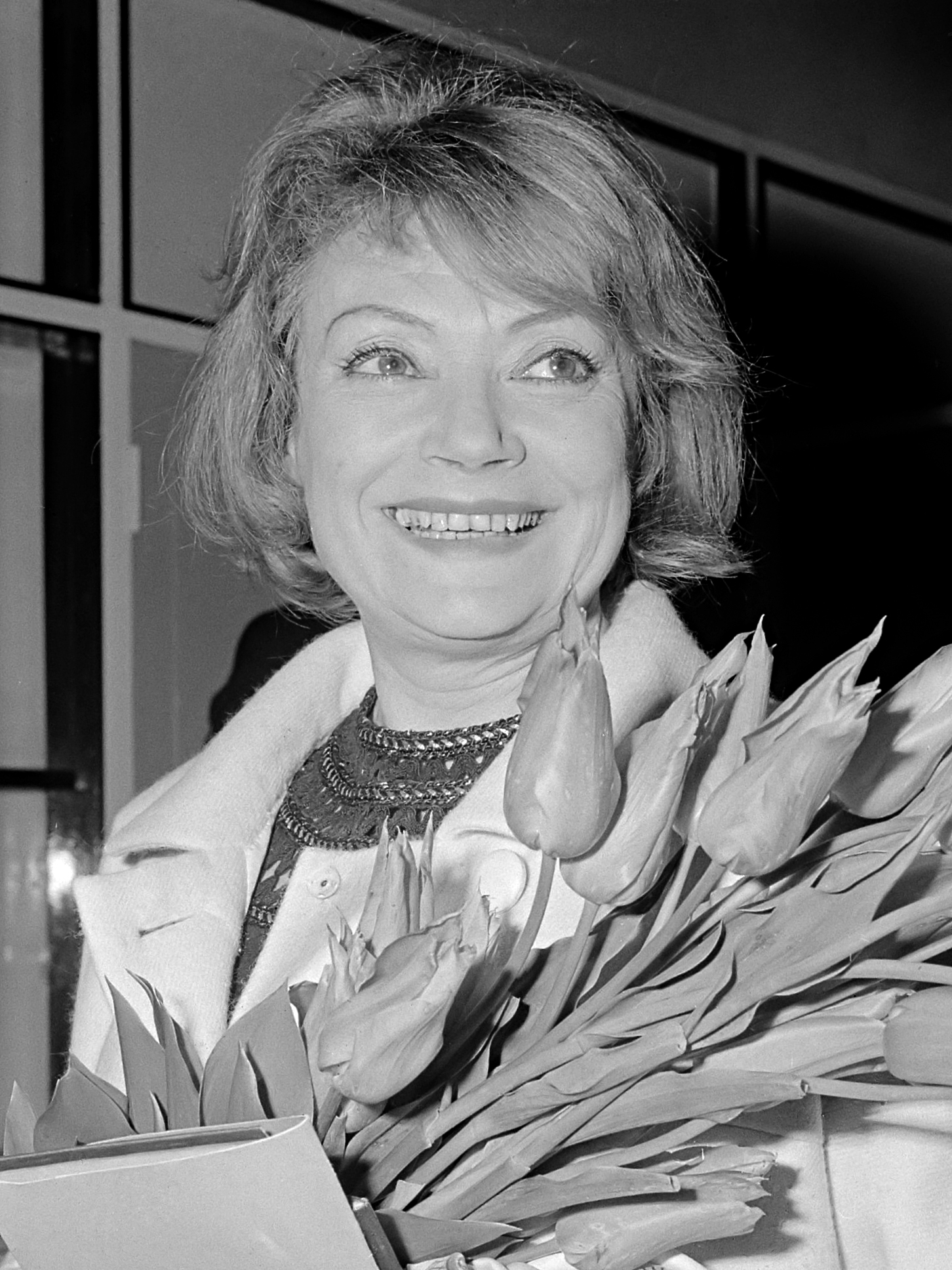 Aankomst Lila Kedrova (Franse filmactirce) op Schiphol 13 mei 1965